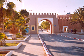 تزنيت